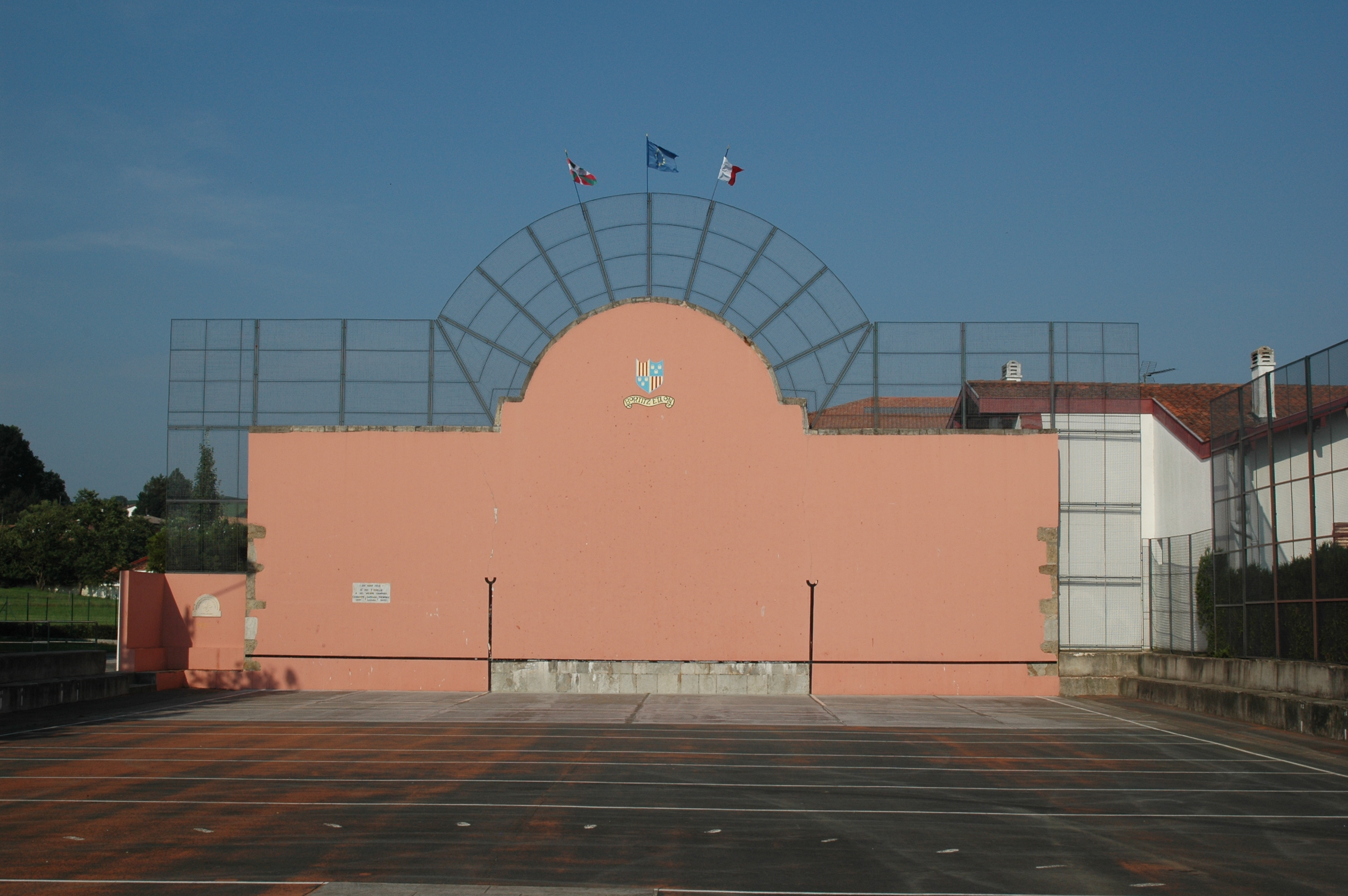 Saint-Pée-sur-Nivelle, le fronton, photo prise le 08/07/06 par Harrieta171